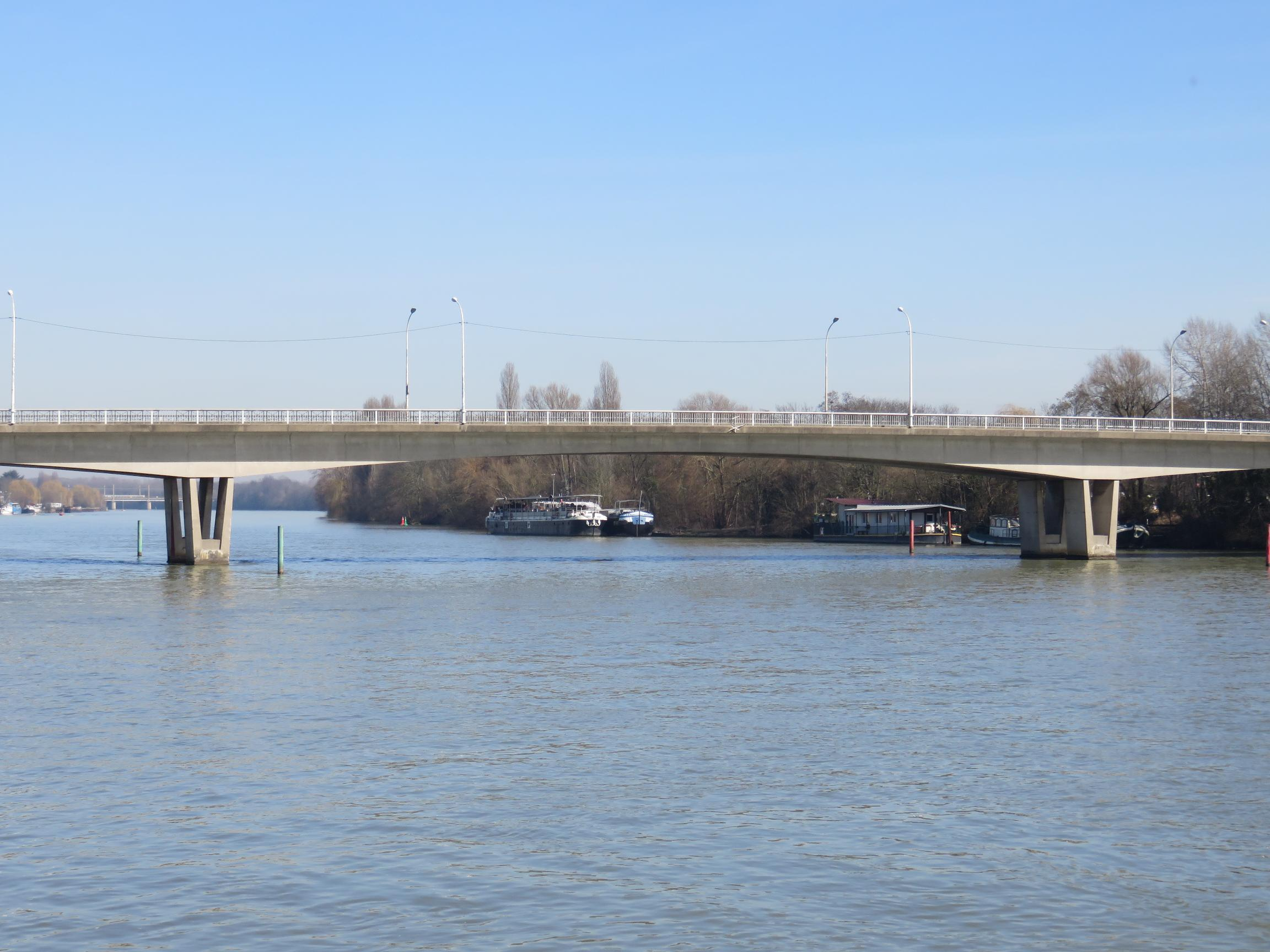 Pont de la première armee entre Juvisy et Draveil.